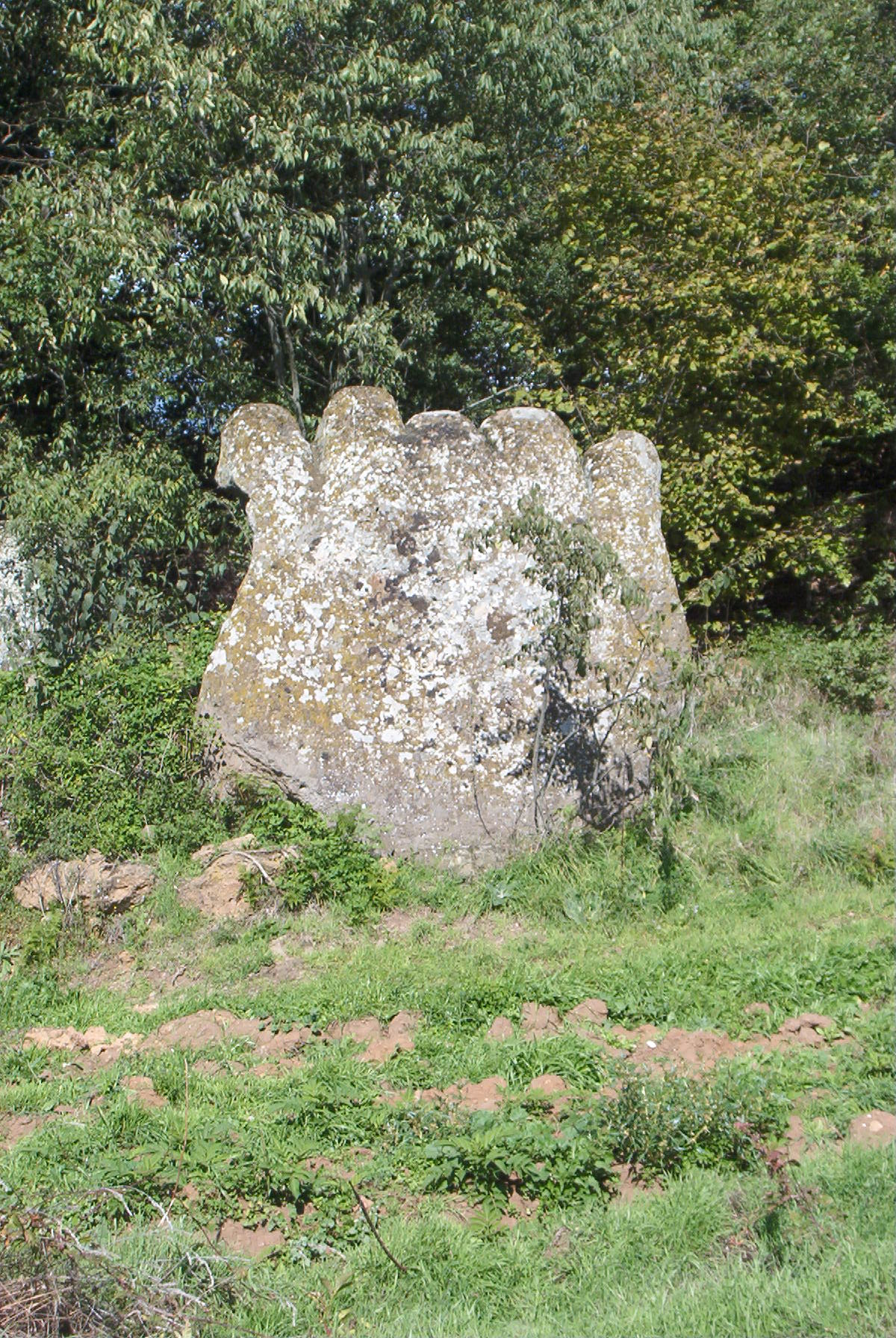 Hand des Orlando an der Landstraße zwischen Sovana und Sorano